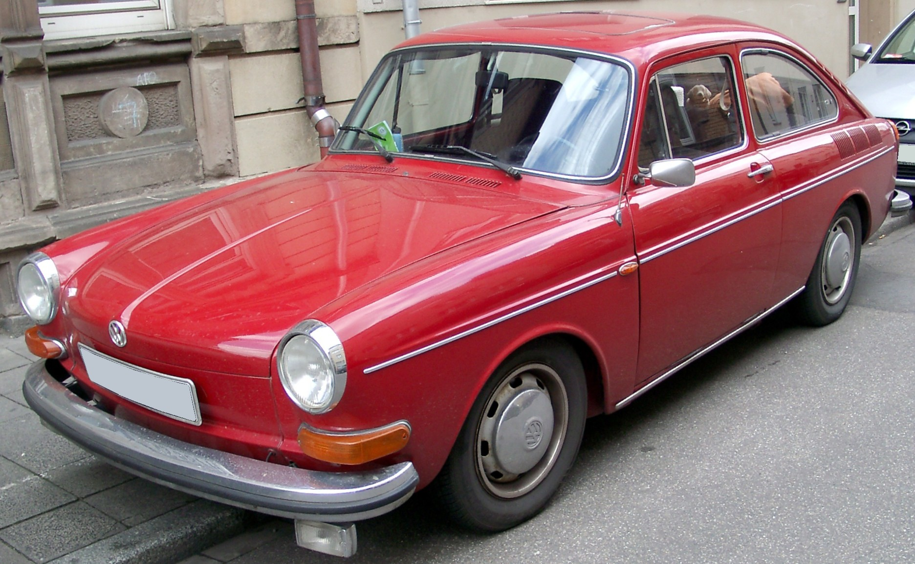 VW Typ 3 (VW 1600 TL)